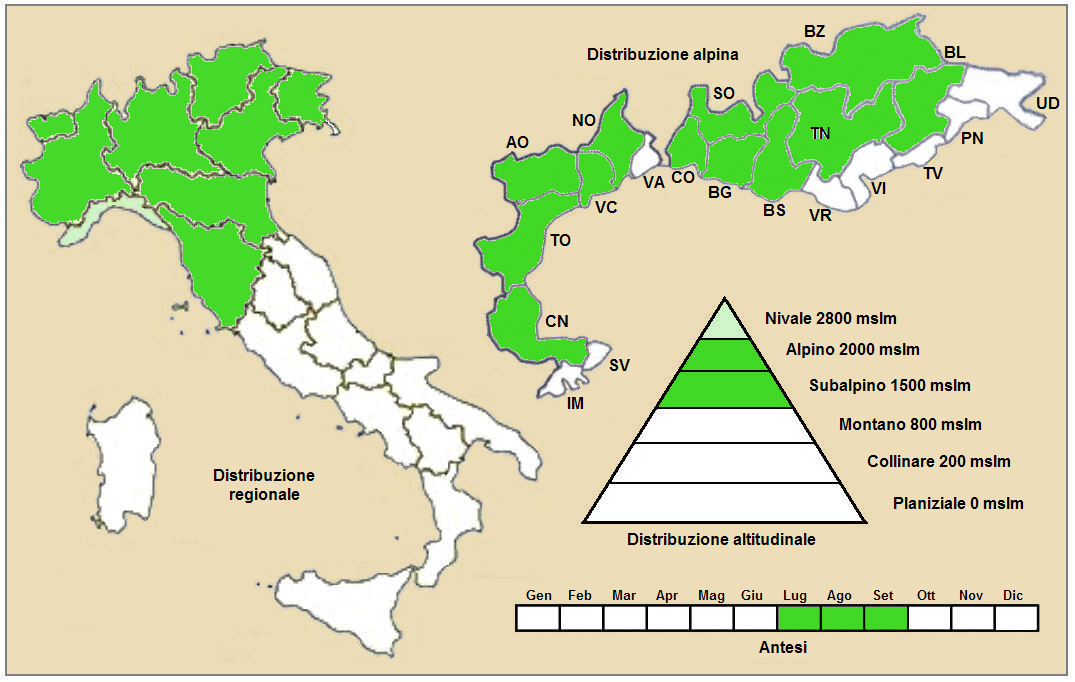 Artemisia umbelliformis umbellisformis – Distribuzione